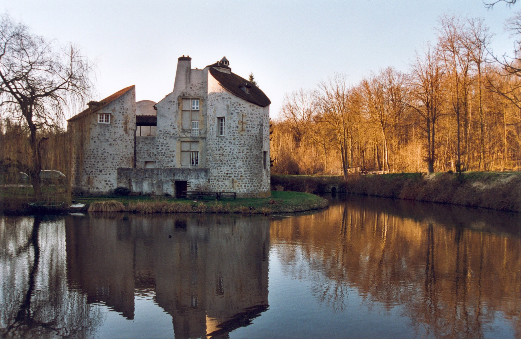 Montmorency, château